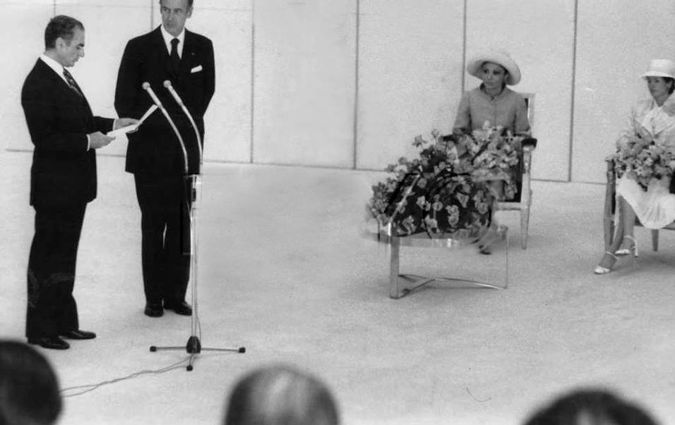 محمدرضا پهلوی در بازدید از فرانسه